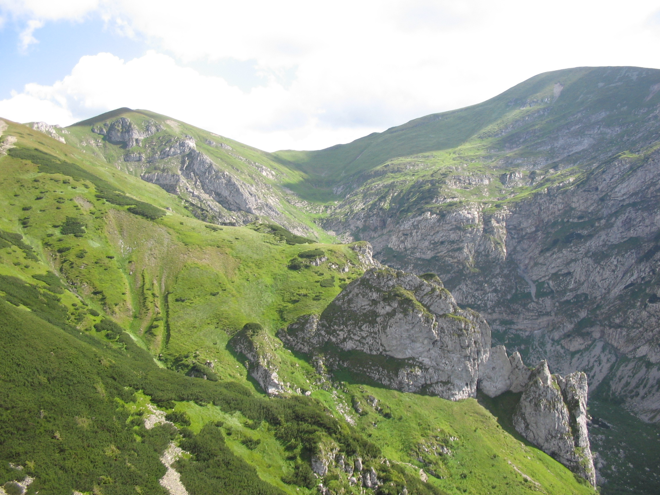 Kraków, Poland